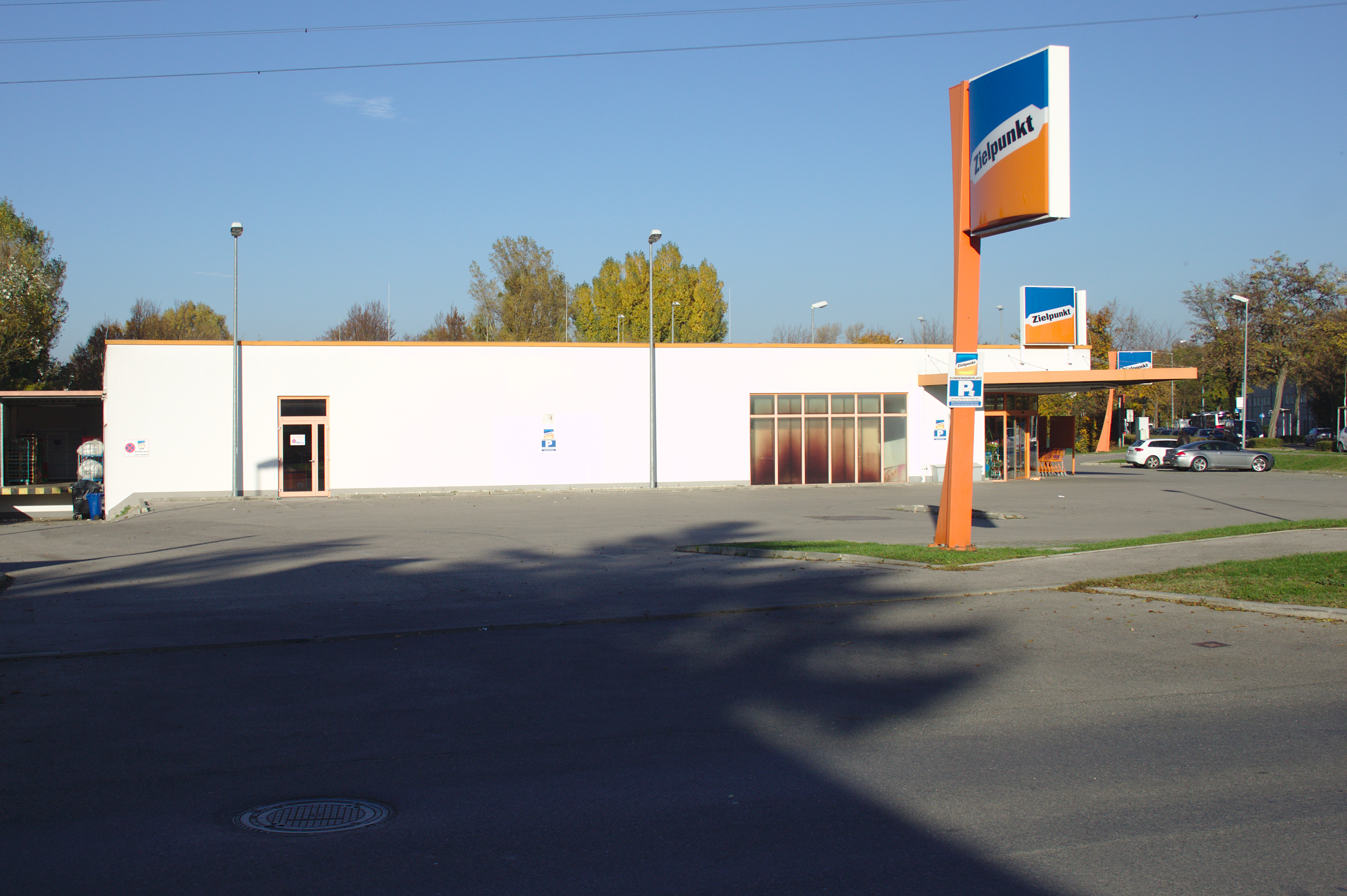 Zielpunkt, Wulzendorfstraße/Biberhaufenweg